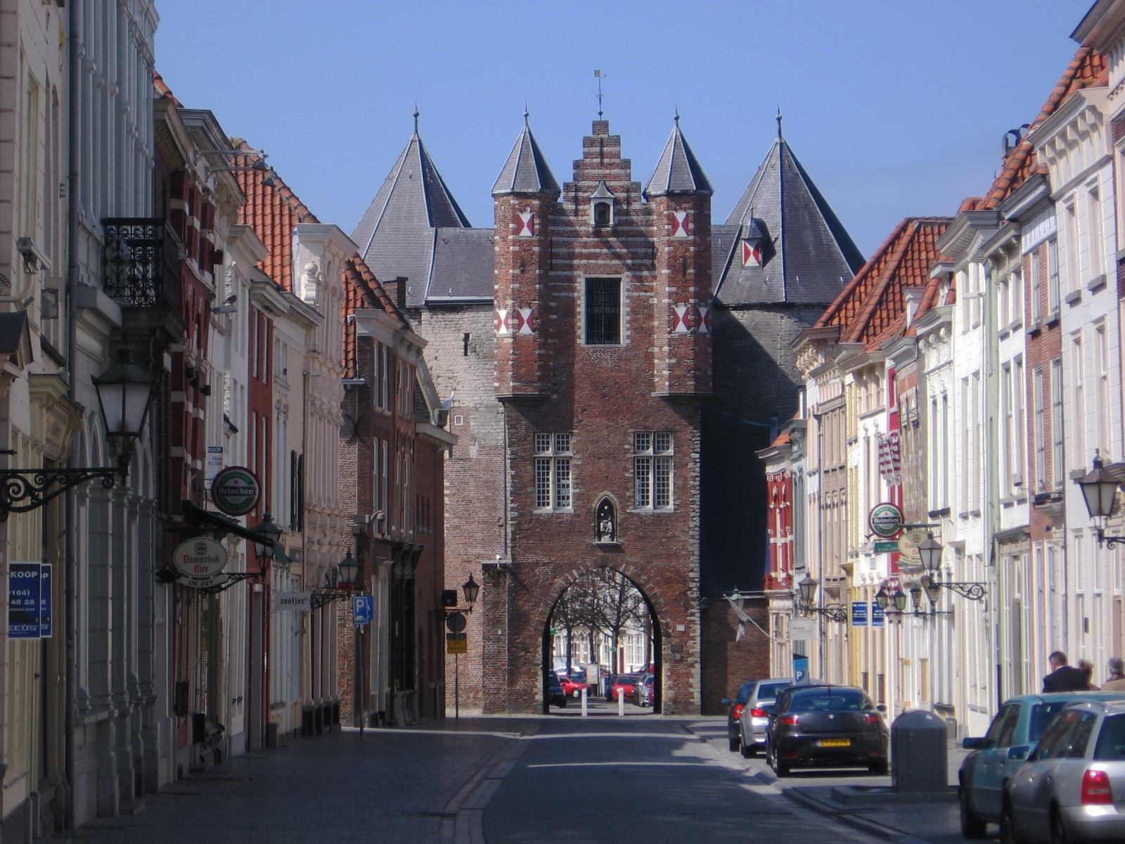 Bergen op Zoom, 17 april 2006